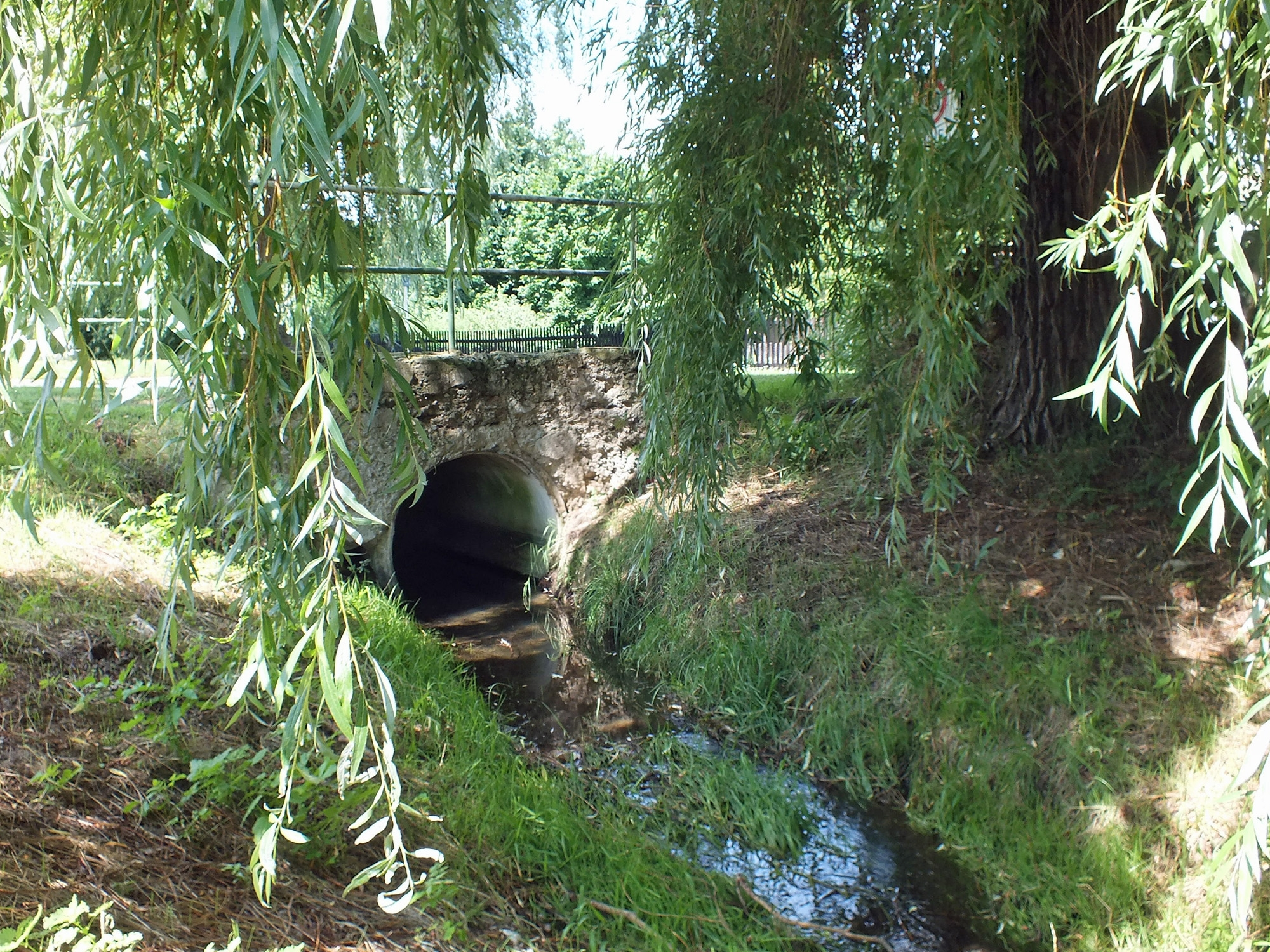 Der Ausgang der Unterführung des Schaukelgrabens unter Straße und Eisenbahnlinie in Liebertwolkwitz